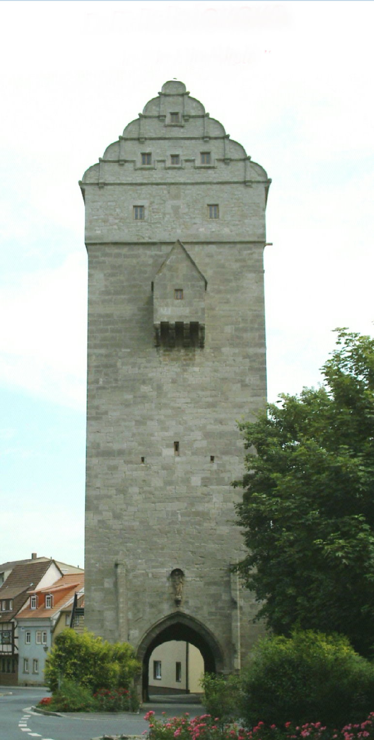 Das Obere Tor in Münnerstadt ist einer der höchsten Stadttortürme Frankens